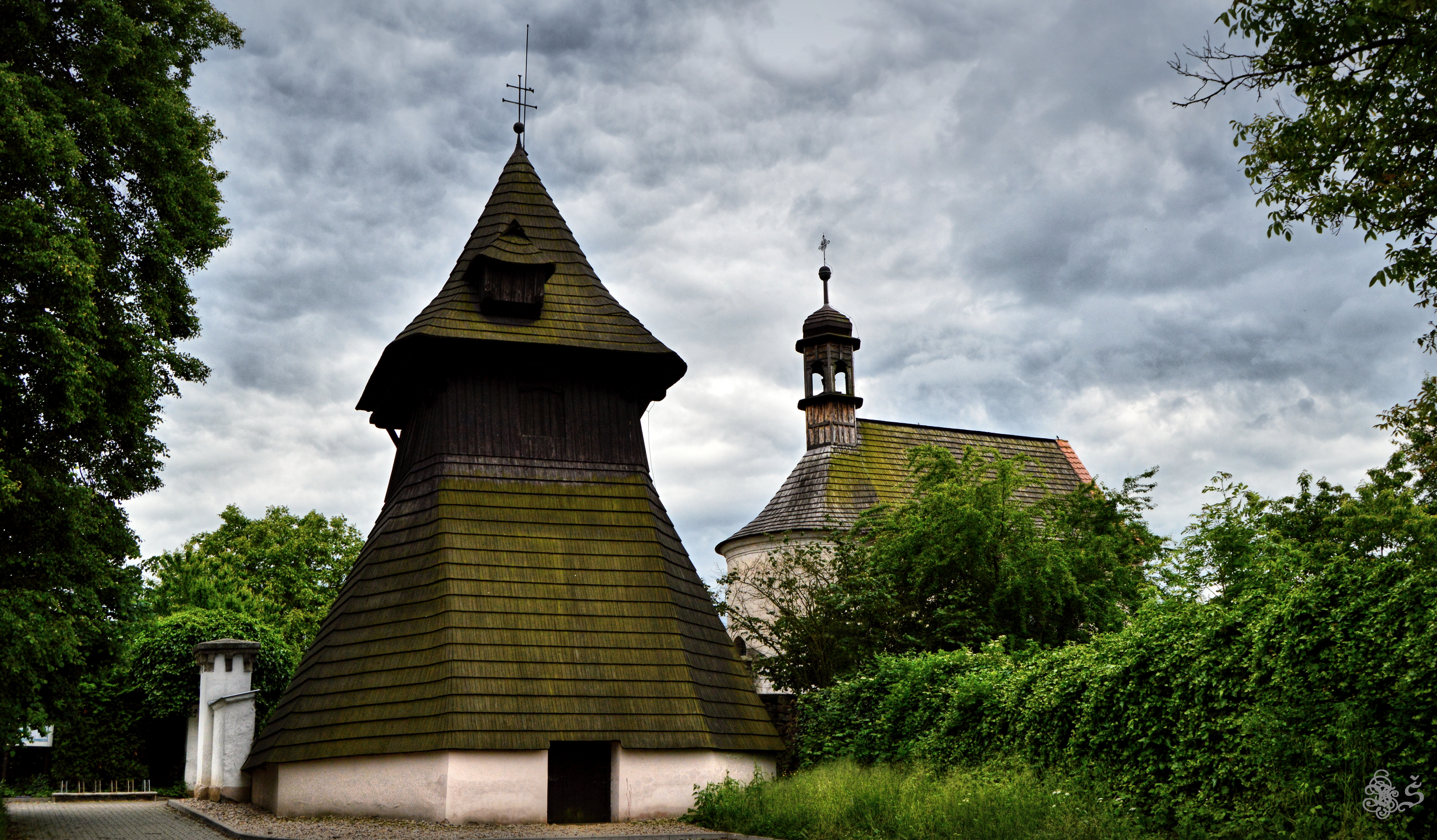 Kostel svatého Jana Křtitele, Semín.